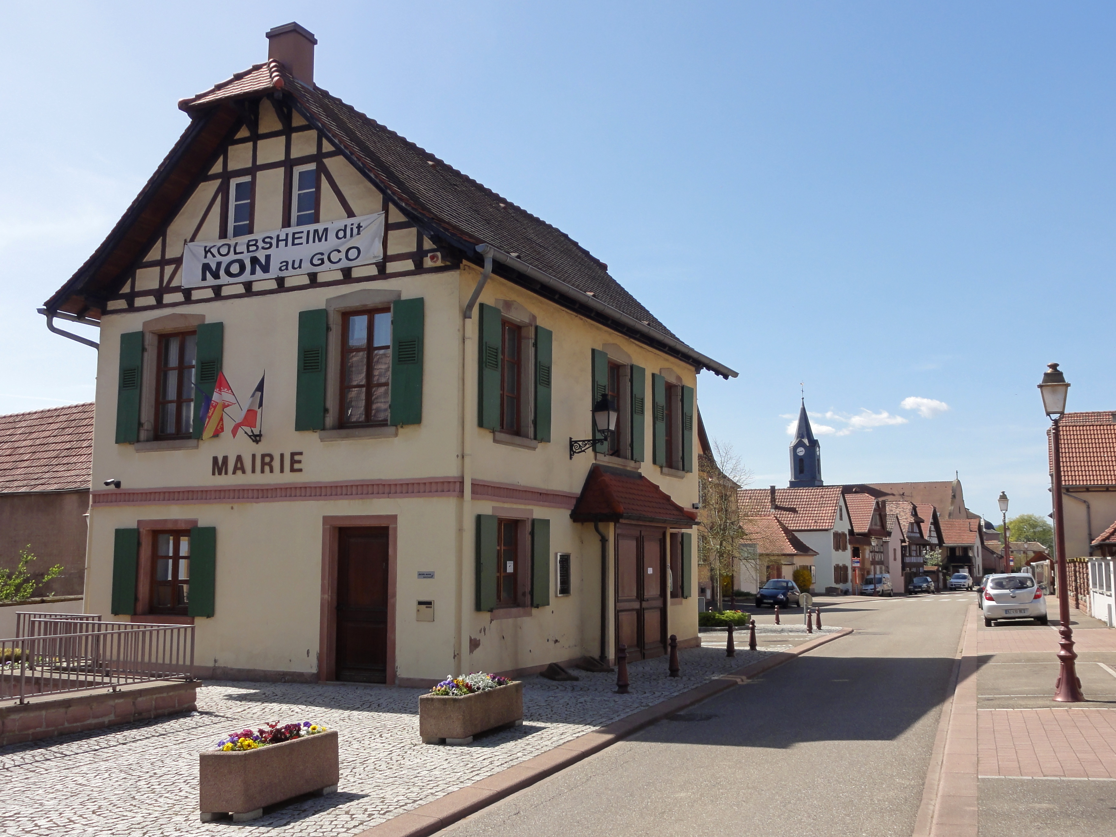 Alsace, Bas-Rhin, Kolbsheim, Mairie, rue de la Division-Leclerc